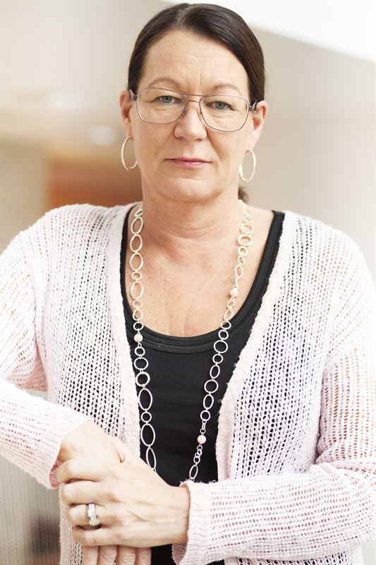 Porträtt på Lenita Granlund, fotograferad av Fredrik Sandin Carlson.